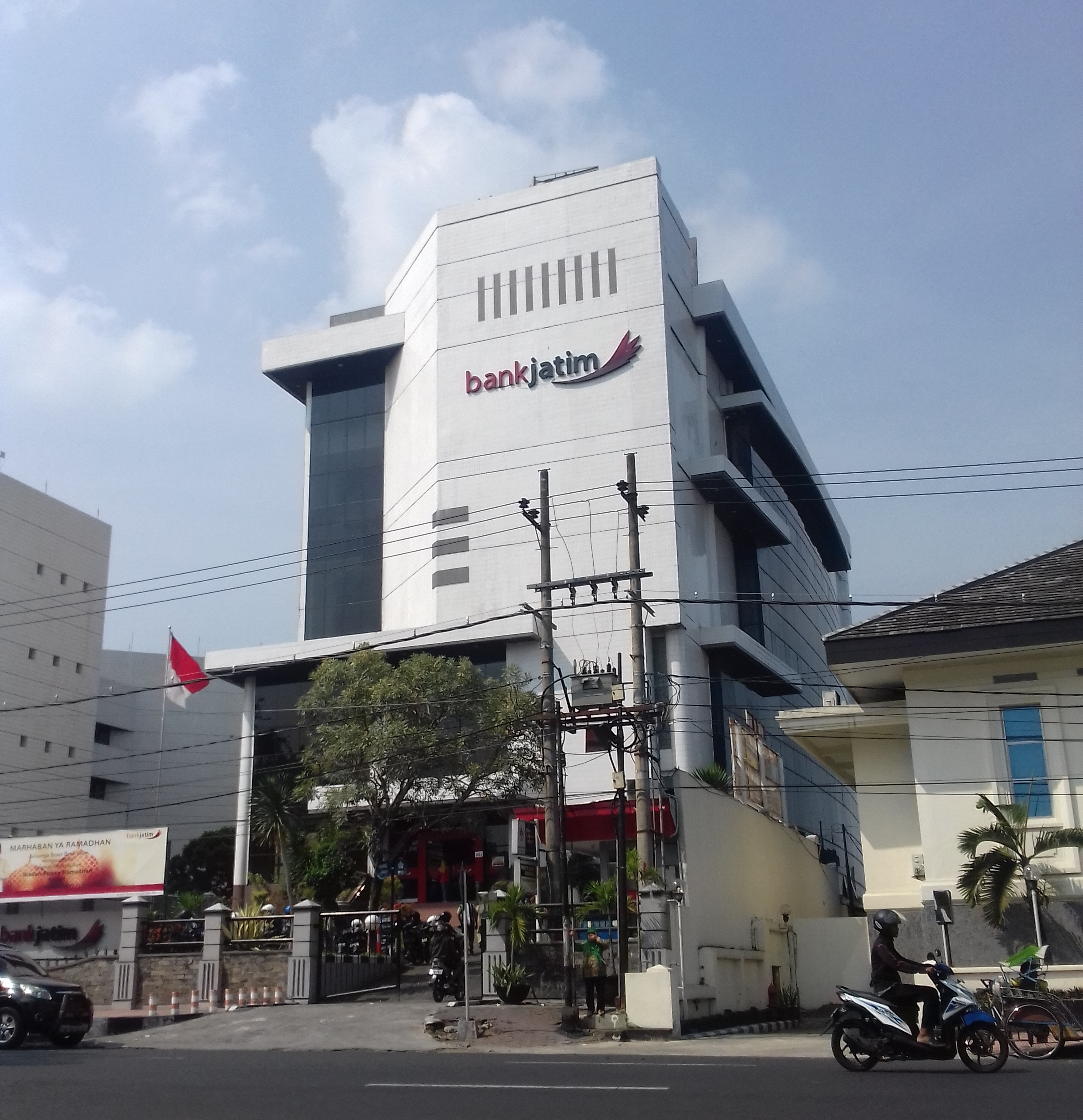 Gedung Bank Jatim KC Jember, berlokasi di dekat Alun-alun Jember